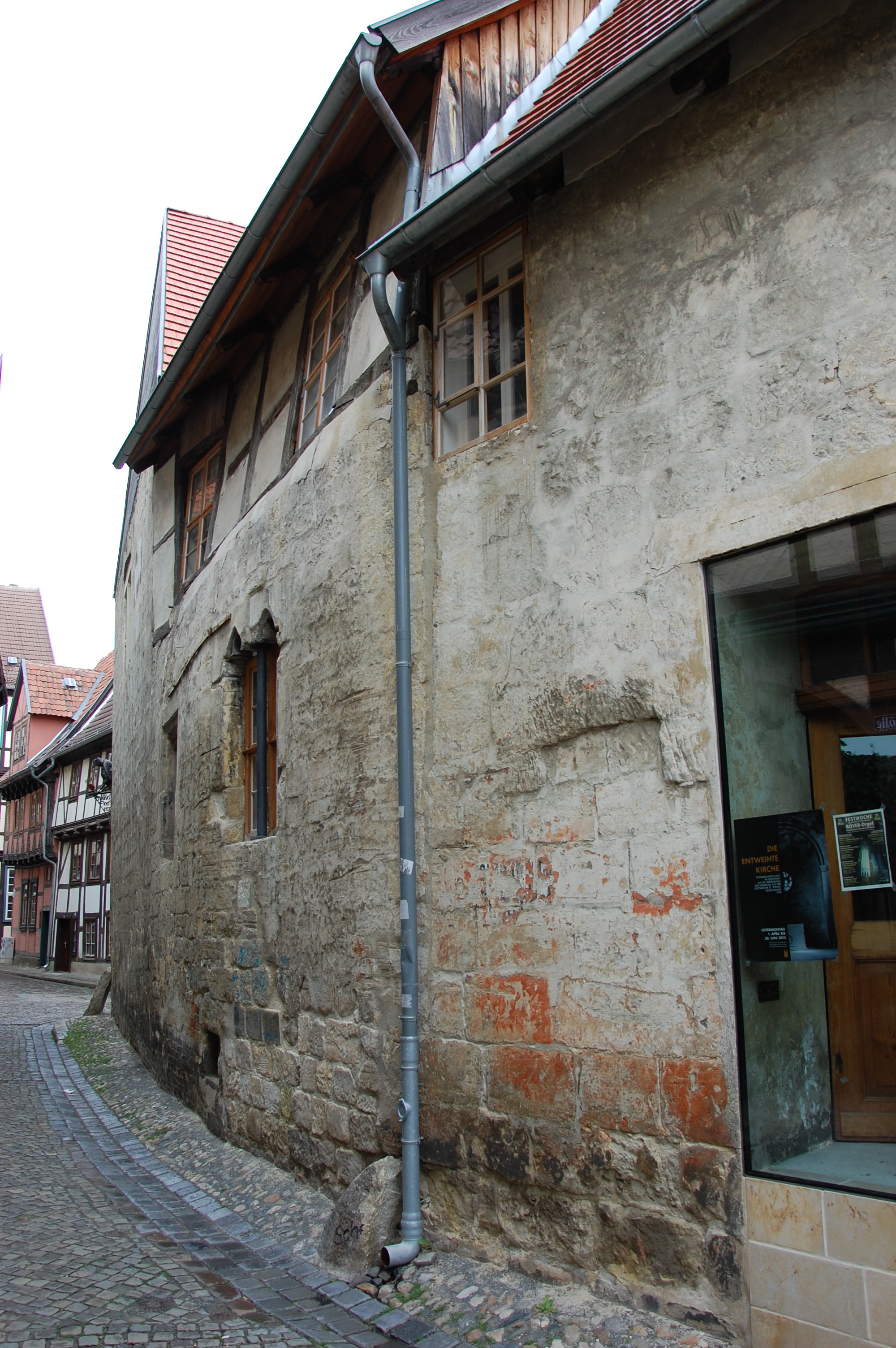 Westseite Haus Hölle 11 in Quedlinburg